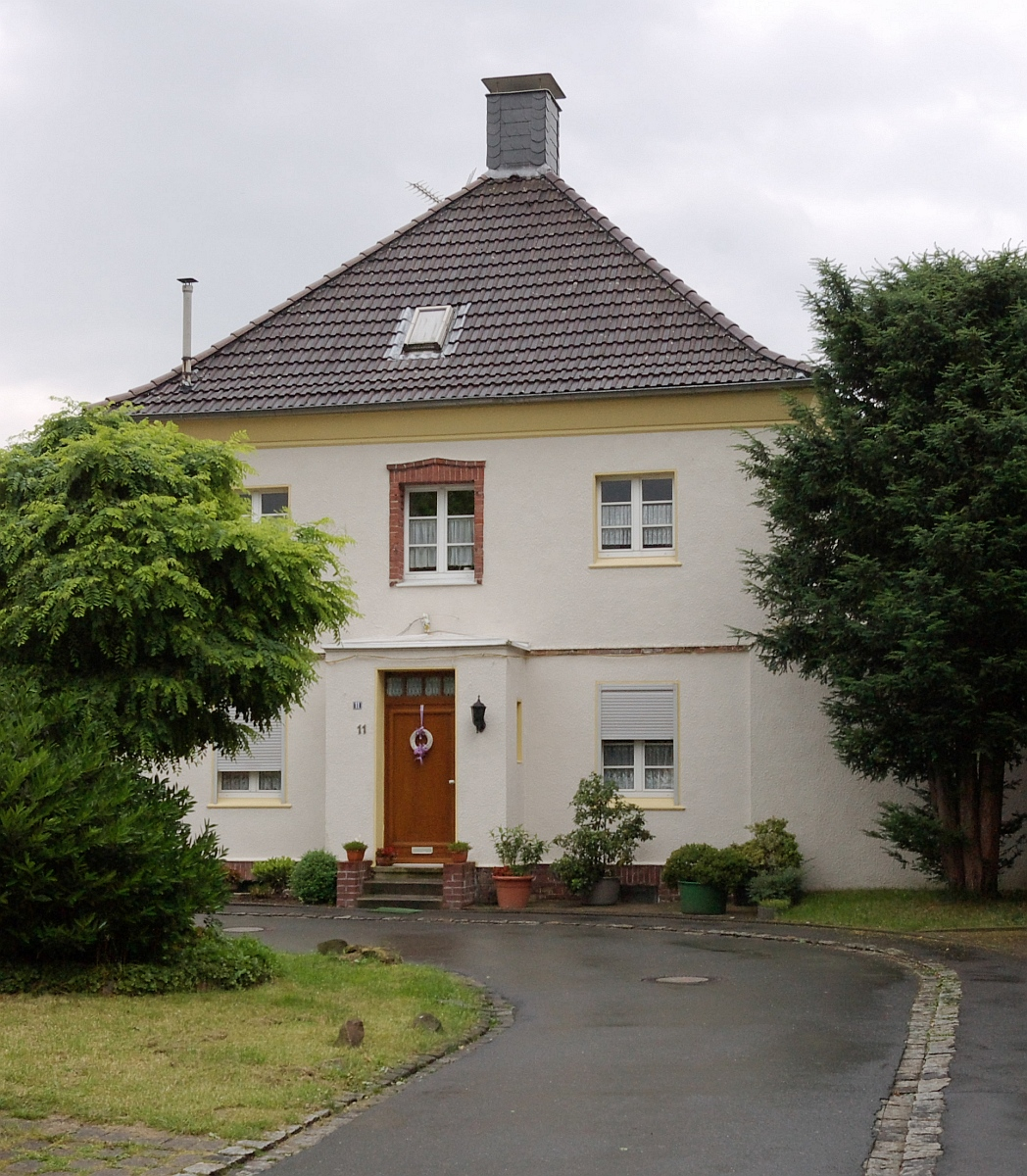 Bergbaubeamtensiedlung "Am Knie" in Dortmund-Neuasseln This is a photograph of an architectural monument. 0002